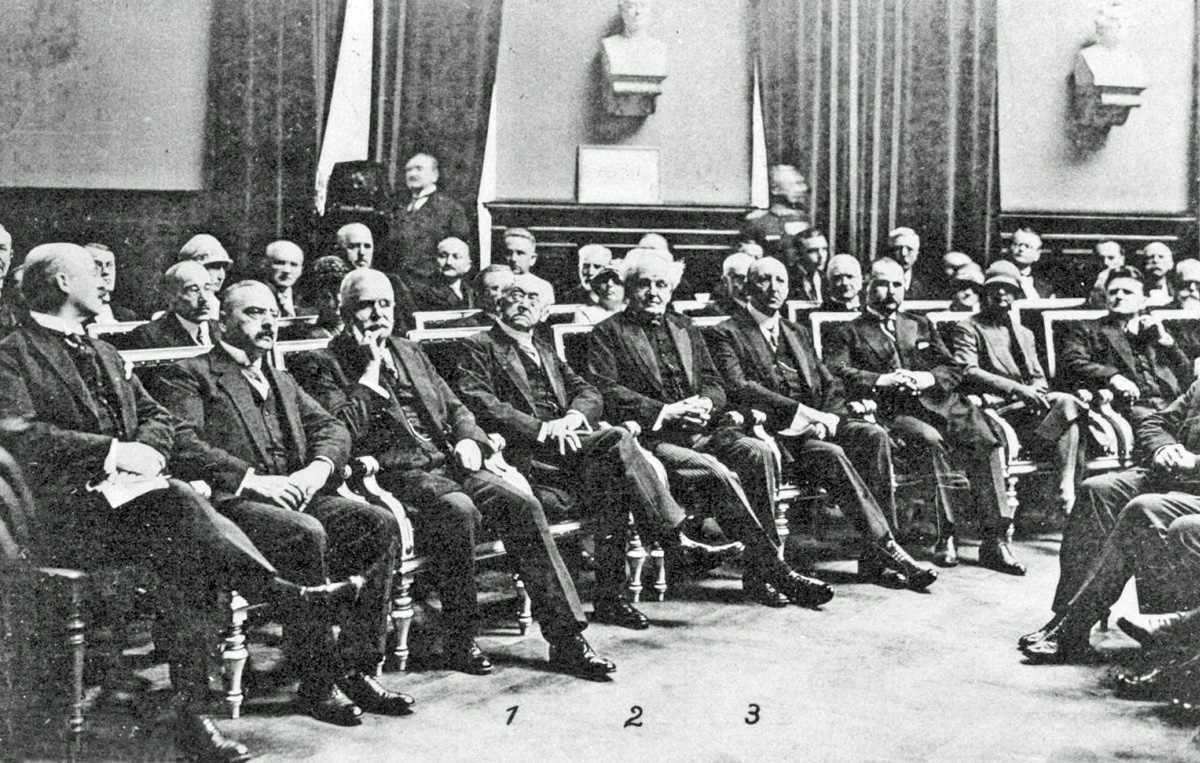 Postkarte von der Eröffnungsveranstaltung der Internationalen Buchkunstausstellung 1927 mit Oberbürgermeister Dr. Rothe (1), Adolph von Harnack (2) und Gerhart Hauptmann (3)